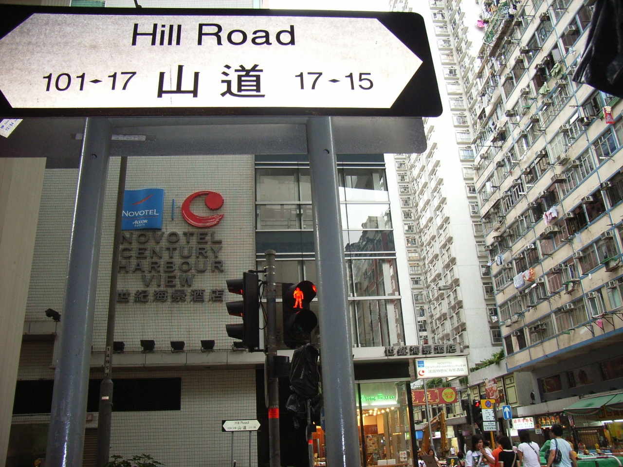 (User:Hillo STT 618) Hill Road, Shek Tong Tsui, Hong Kong